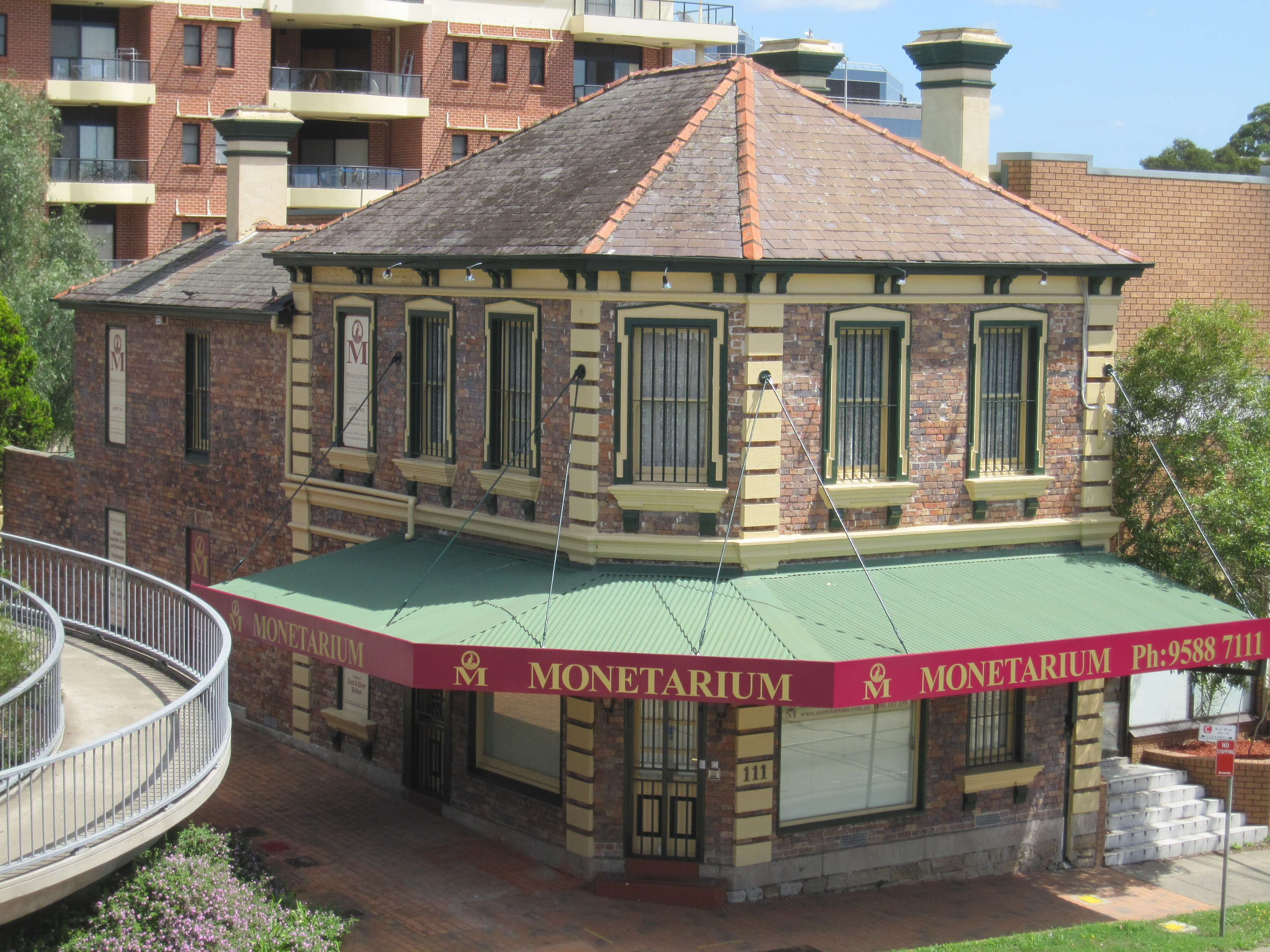 Kogarah Monetarium